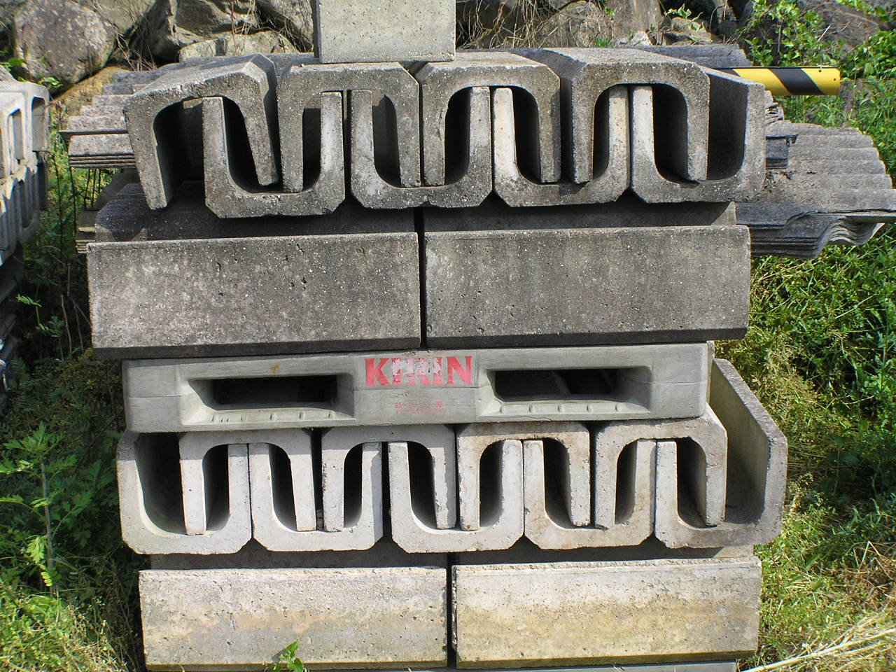 U字溝